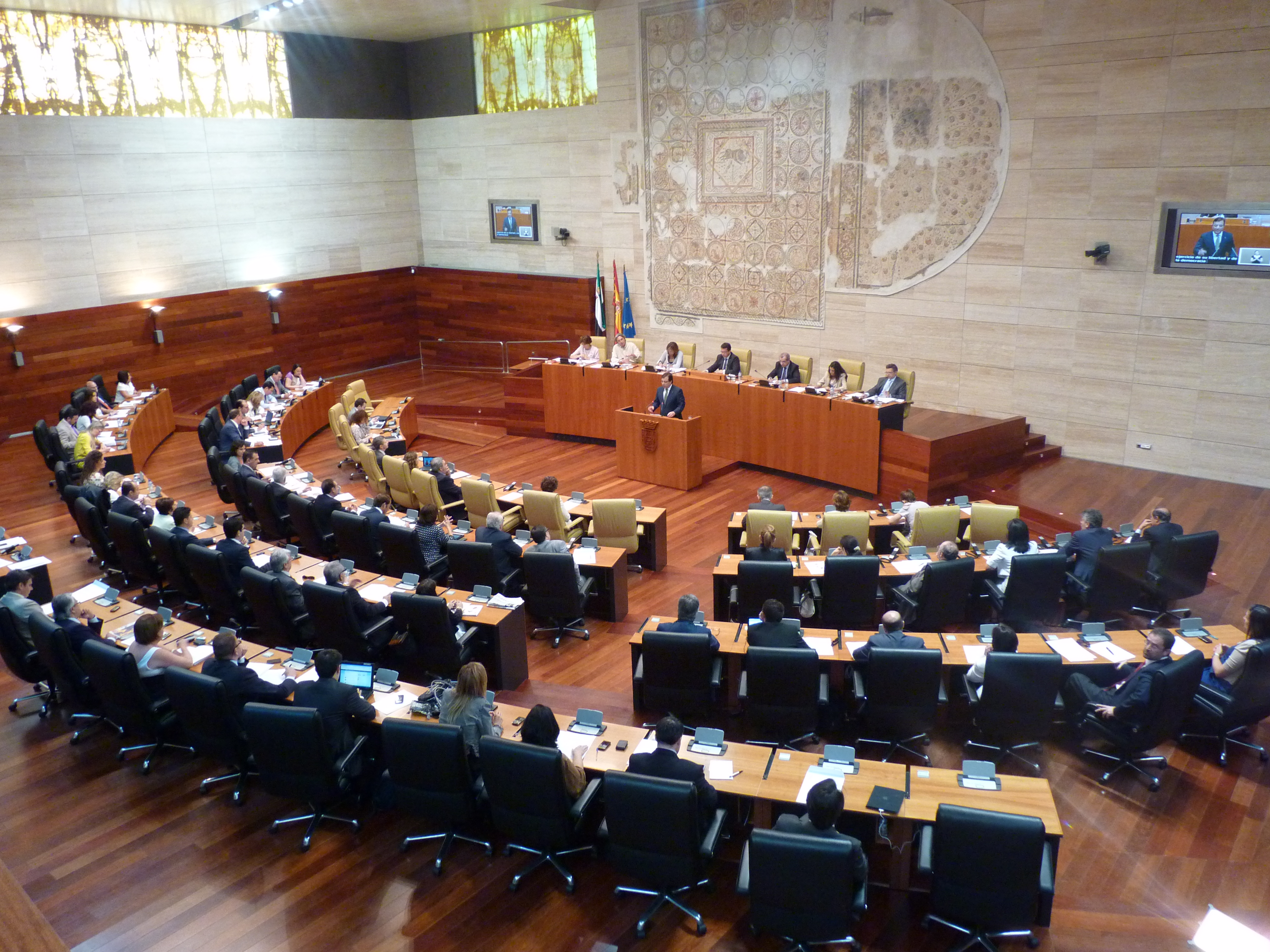 Pleno de la Asamblea de Extremadura